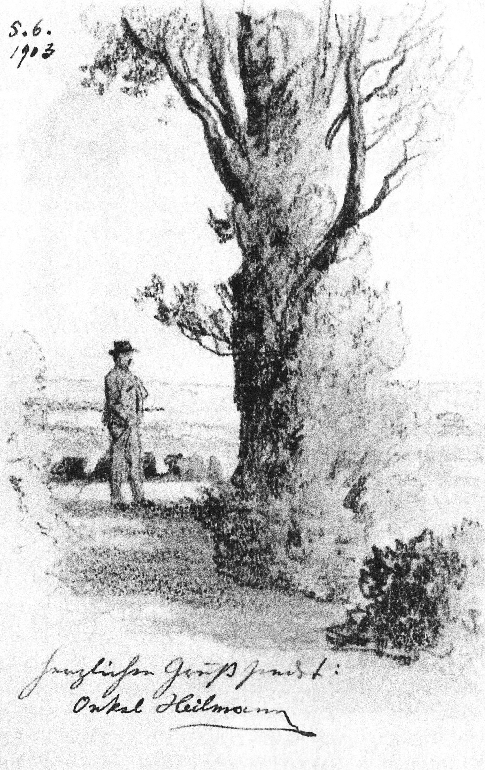 Selbstbildnis am Meer, handgezeichnete Postkarte von Anton Paul Heilmann mit dem eigenhändigen Vermerk „Herzlichen Gruß sendet: Onkel Heilmann“